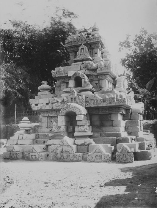 foto. Indo-Javaanse tempel bij Karangnongko tijdens of na de opgraving